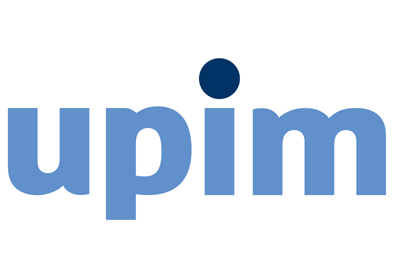 Logo-UPIM